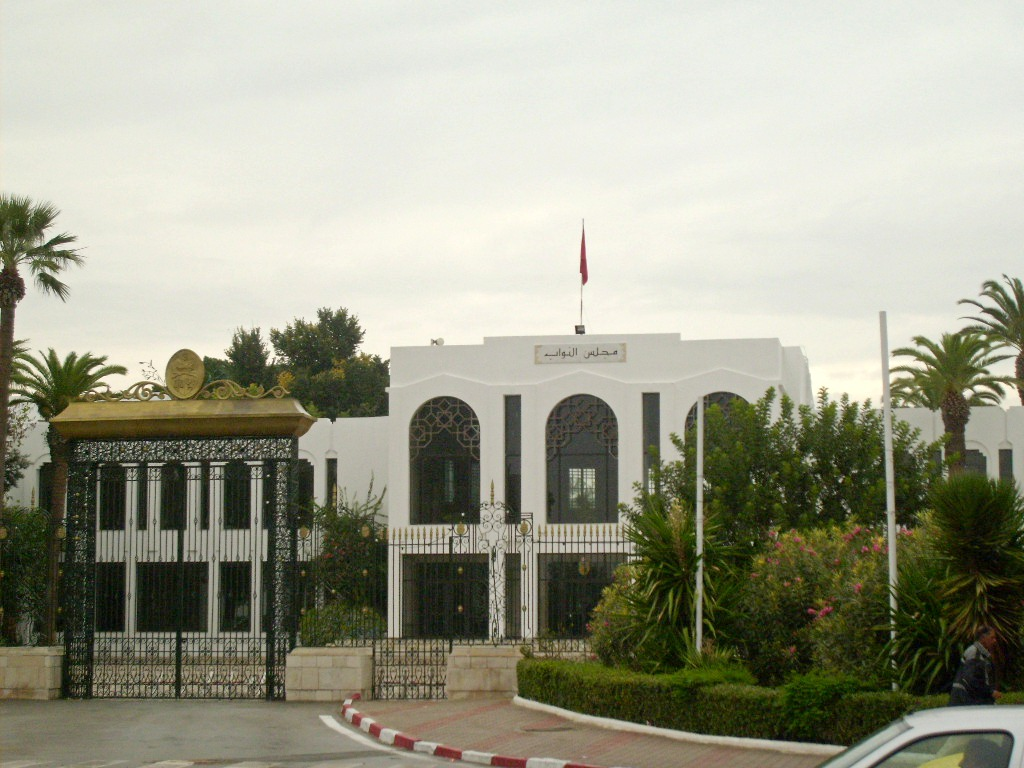 Siège de la Chambre des députés situé au Bardo près de Tunis (Tunisie)